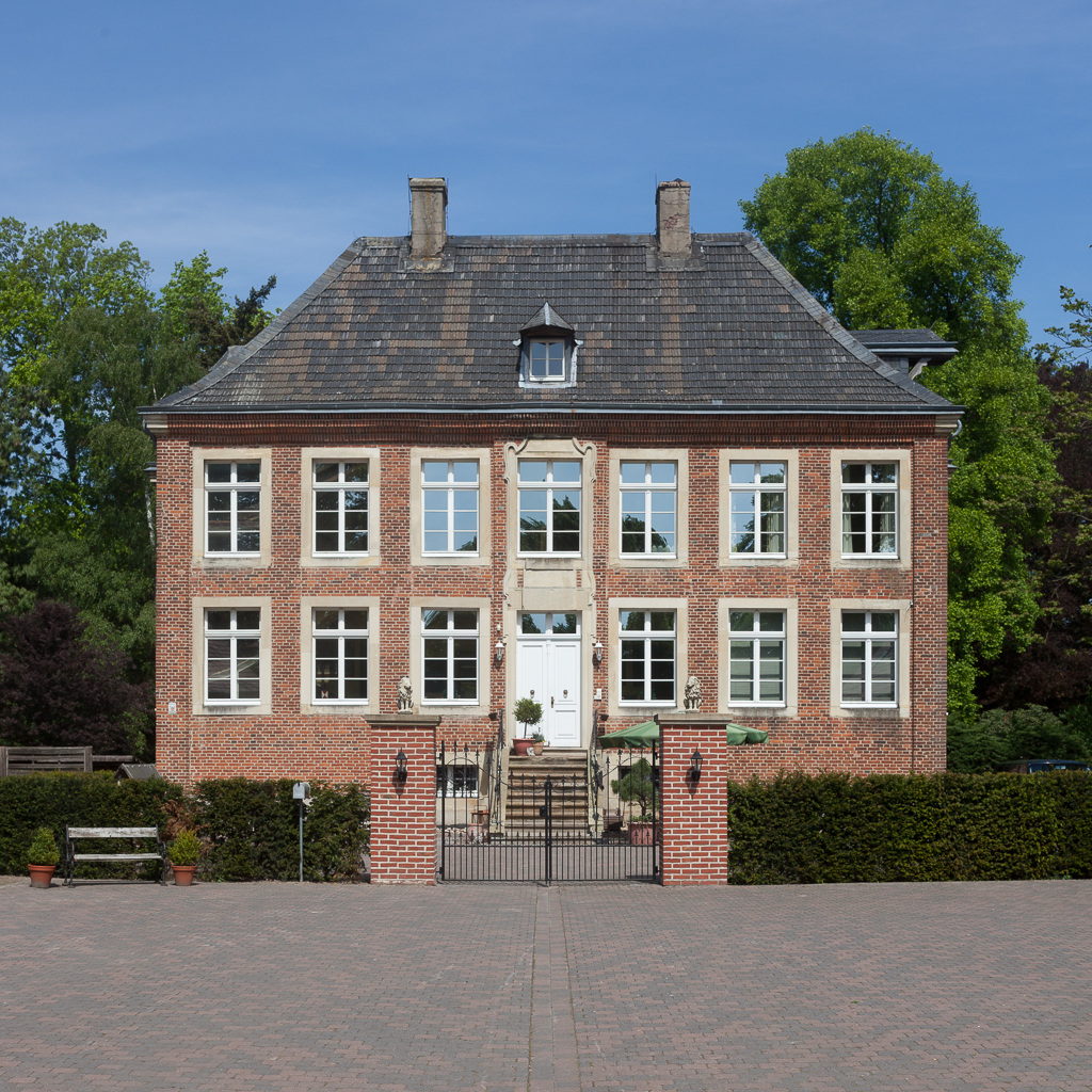 Haus Alvinghof im Jahre 2011